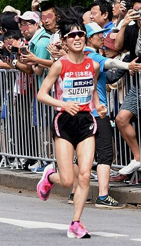 鈴木 亜由子